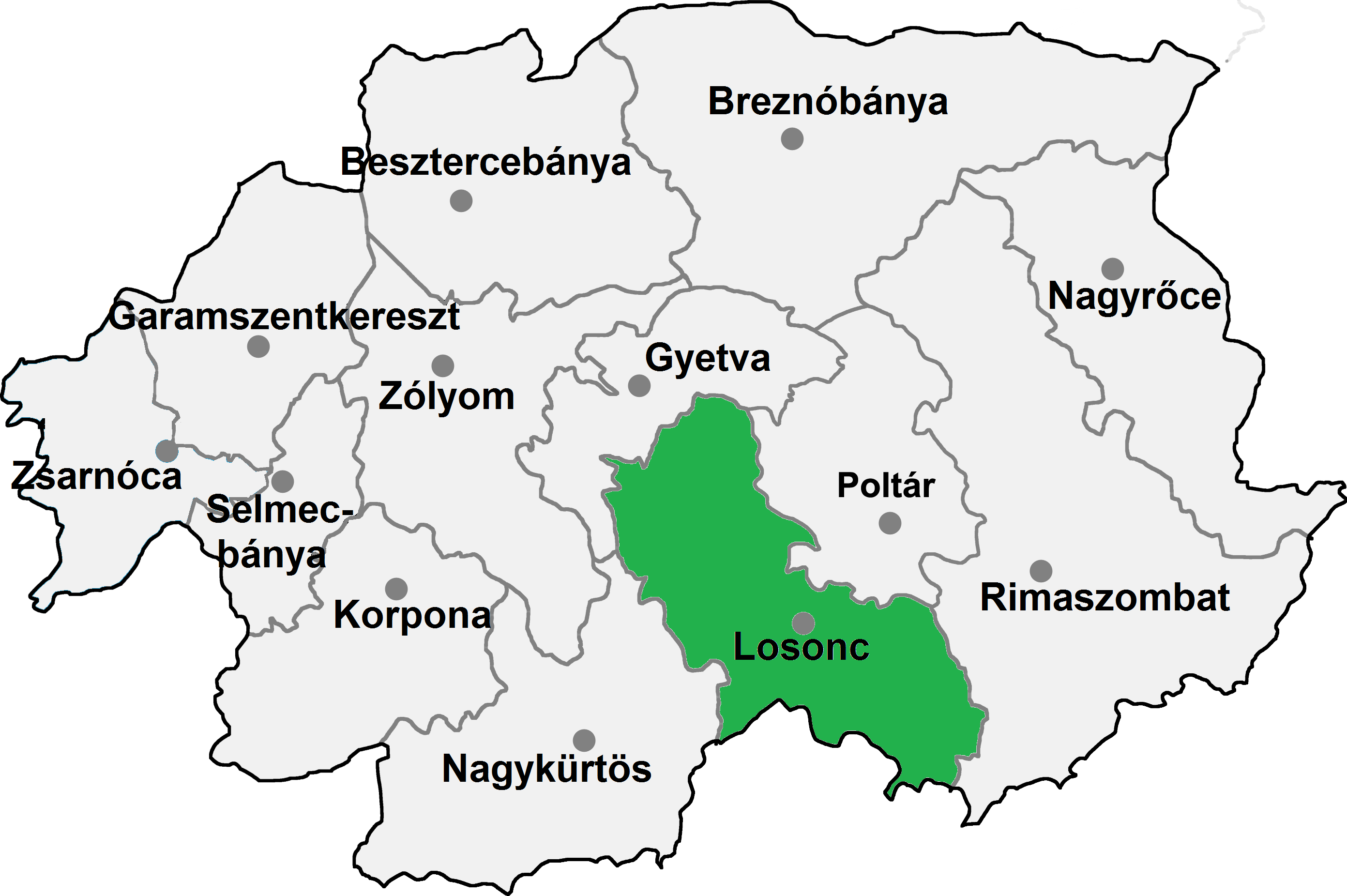 Losonci járás